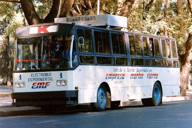 Imágen corregida digitalmente del "Electrobús Experimental" que la Empresa Martín Fierro S.R.L. ensayó durante 1982. La foto pertenece al folleto de la memoria descriptiva. Esta unidad fue luego transformada en trolebús adoptando el número 24, y su última numeración fue el 2. Alcanzó a funcionar en la línea M, siendo destinado desde la diaselización de esta línea, a la K.